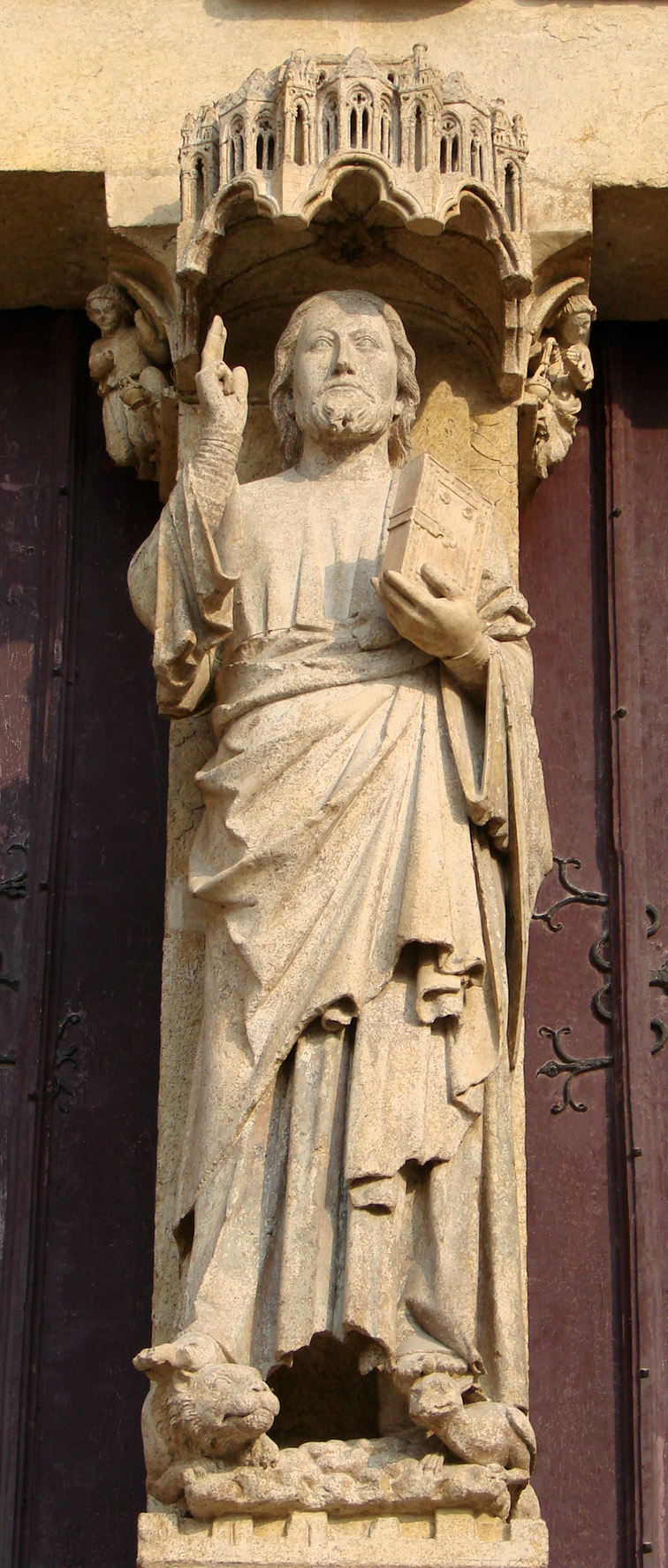 Christ bénissant,portail de la cathédrale d'Amiens.